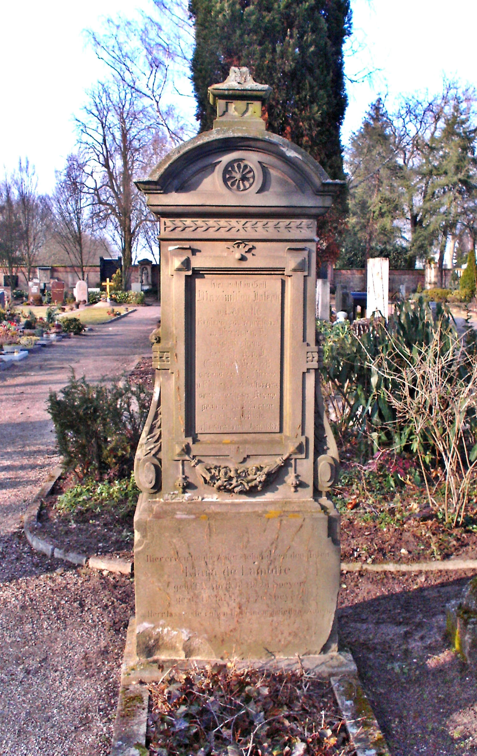 Grabstein Maximilian Joseph von Lamotte (1809-1887), Vize-Regierungspräsident der Pfalz, neuer Friedhof Speyer